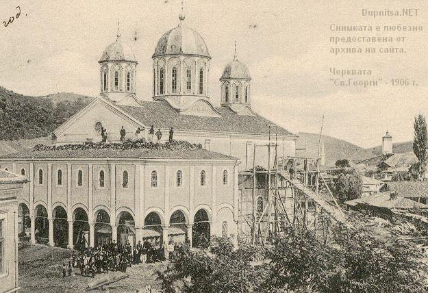 черквата "Св.Георги" в гр.Дупница снимката е направена 1906 год благодарим за снимката на Официалния сайт на гр.Дупница